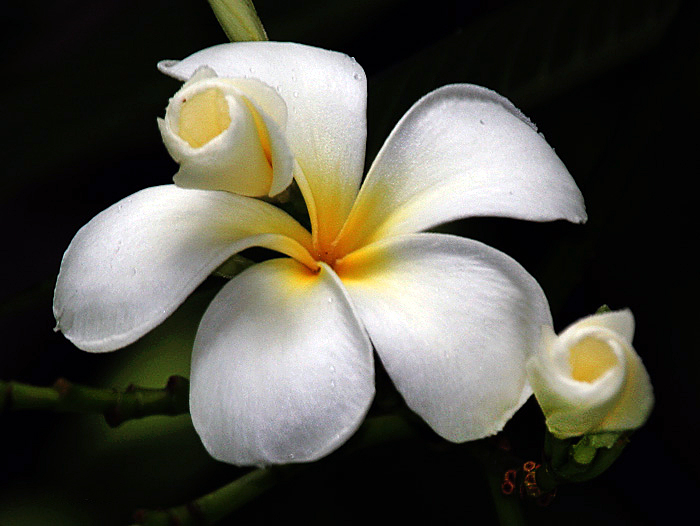 White Frangipani Plumeria obtusa in Kolkata, West Bengal, India.